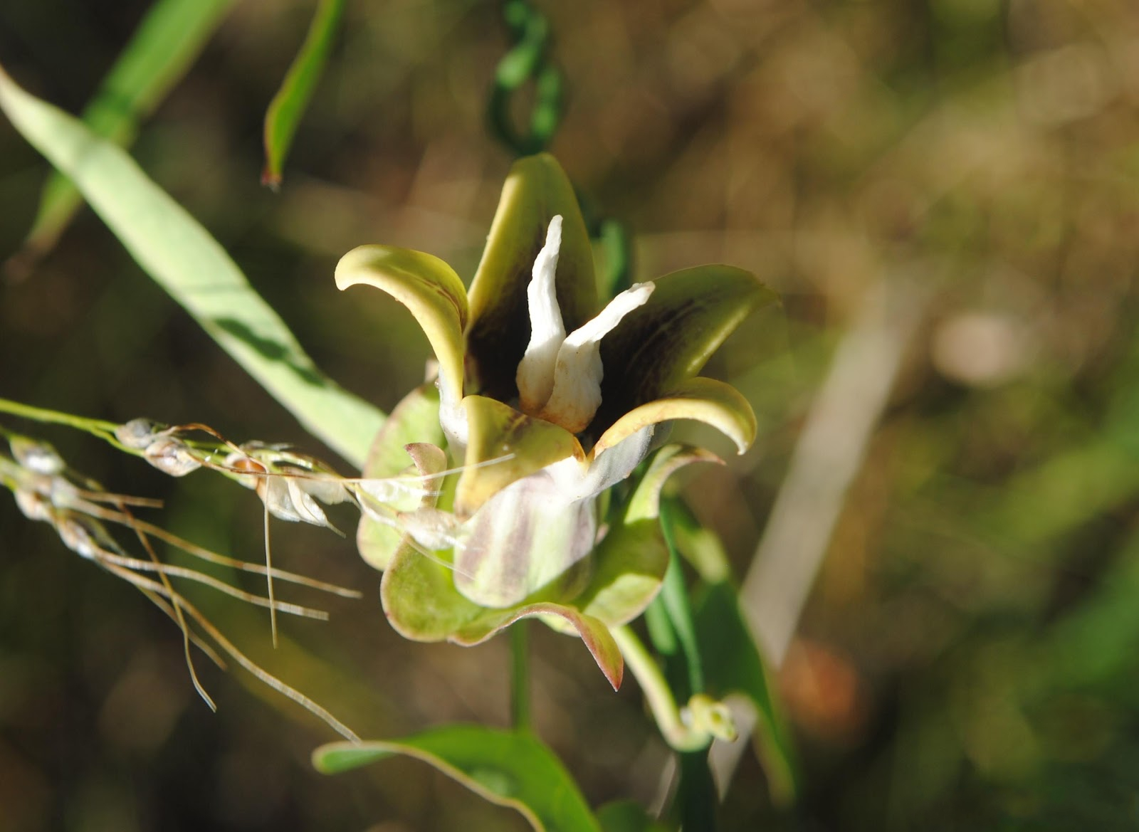 Araujia megapotamica. Apocynaceae. Fotos tomadas en pequeño bosque de espinillos al márgen del Río Negro cercano a la Represa Constitución, departamento de Río Negro y en bosque ribereño al márgen del Río Negro en Palmar, departamento de Soriano, Uruguay.